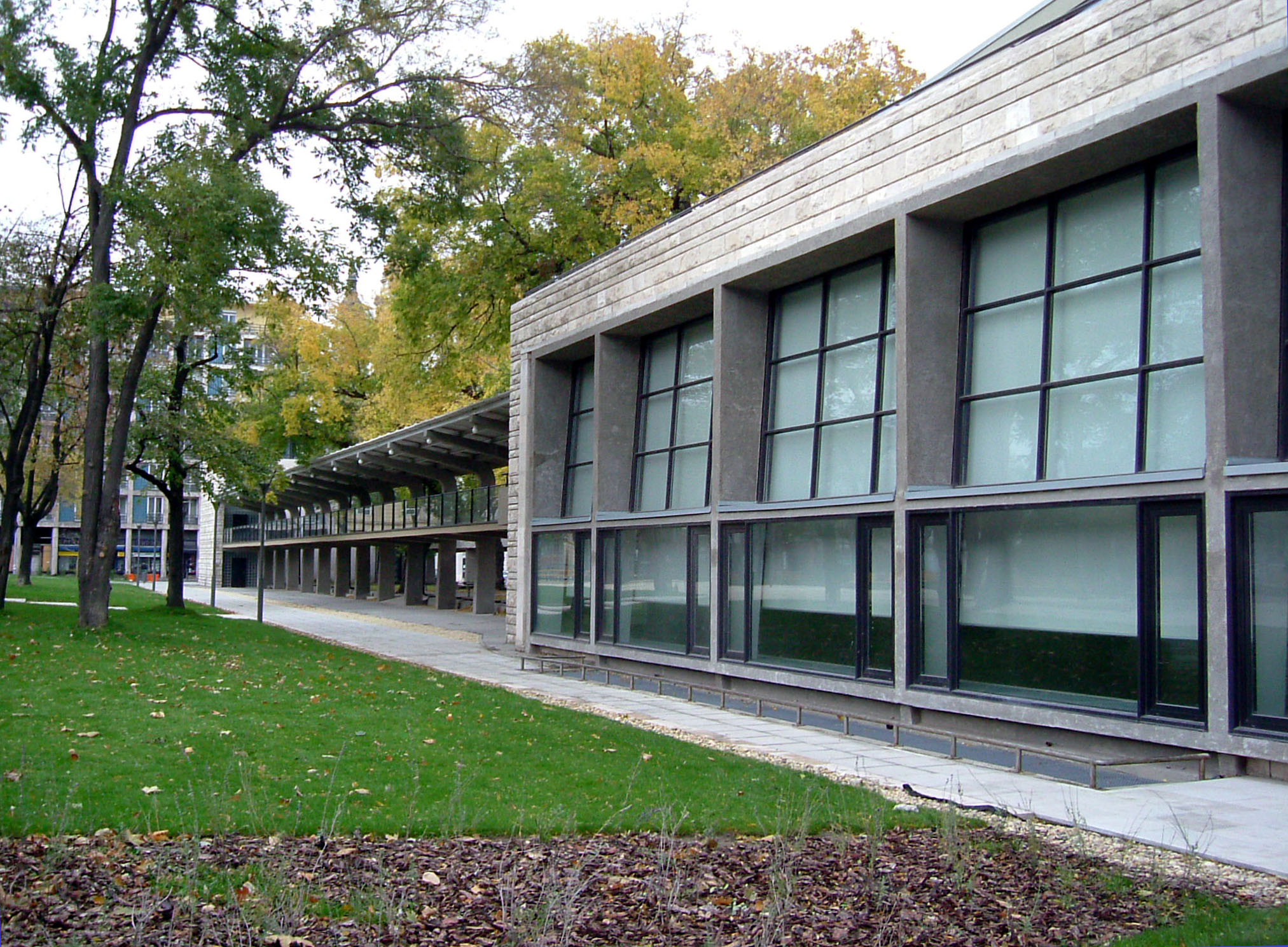 Autobusové nádraží v Budapešti na náměstí Erzsebét tér